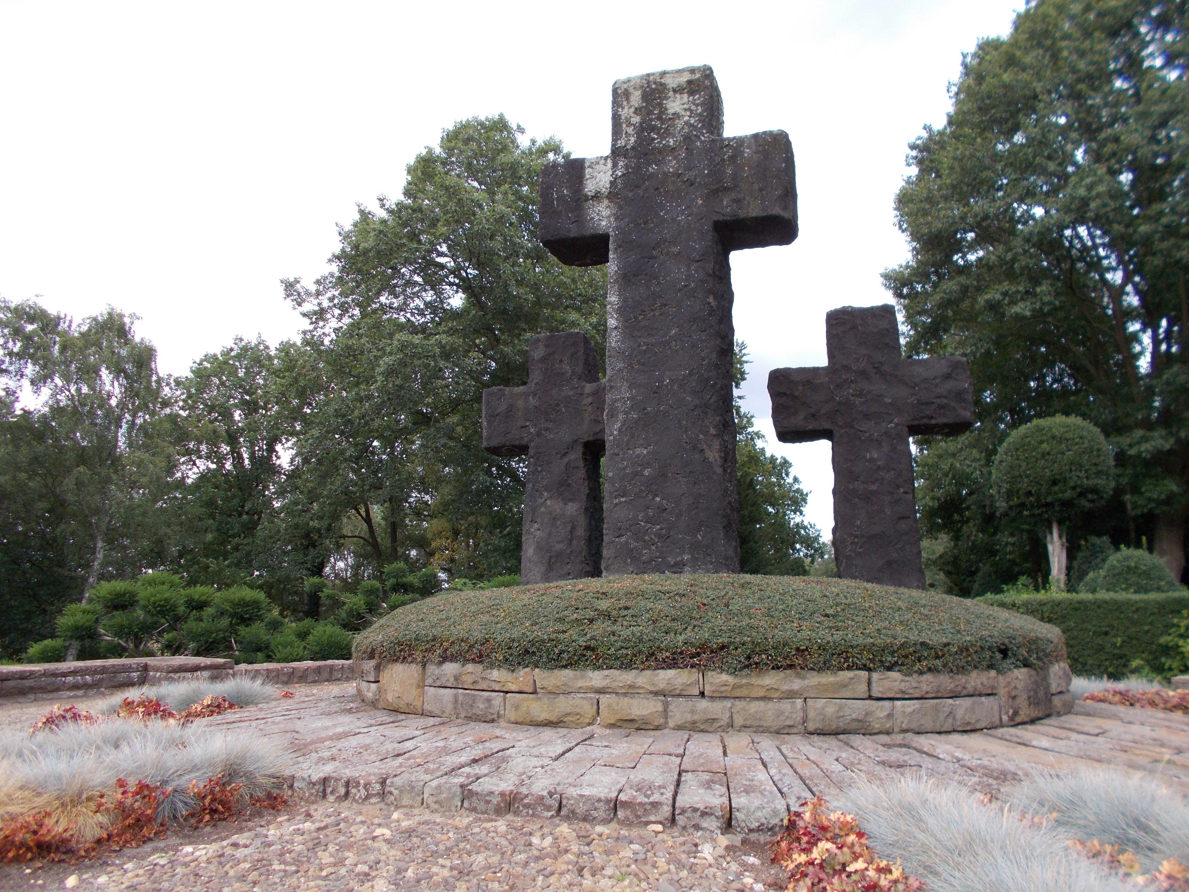 Hochkreuzgruppe aus schwarzen Basalt. Die Kreuze wurden aus einem 275 Tonnen schweren Monoliten geschnitten. Das mittlere Kreuz ist 5 m hoch und hat ein Gewicht von 19 Tonnen, die beiden Seitenkreuze sind jeweils 3,50 m hoch und je 15 Tonnen schwer.